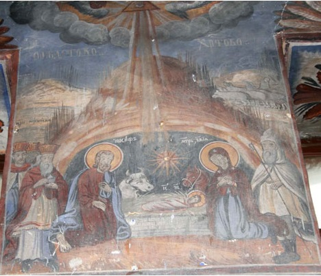 Рождество, фреска от гостиварското село Куново